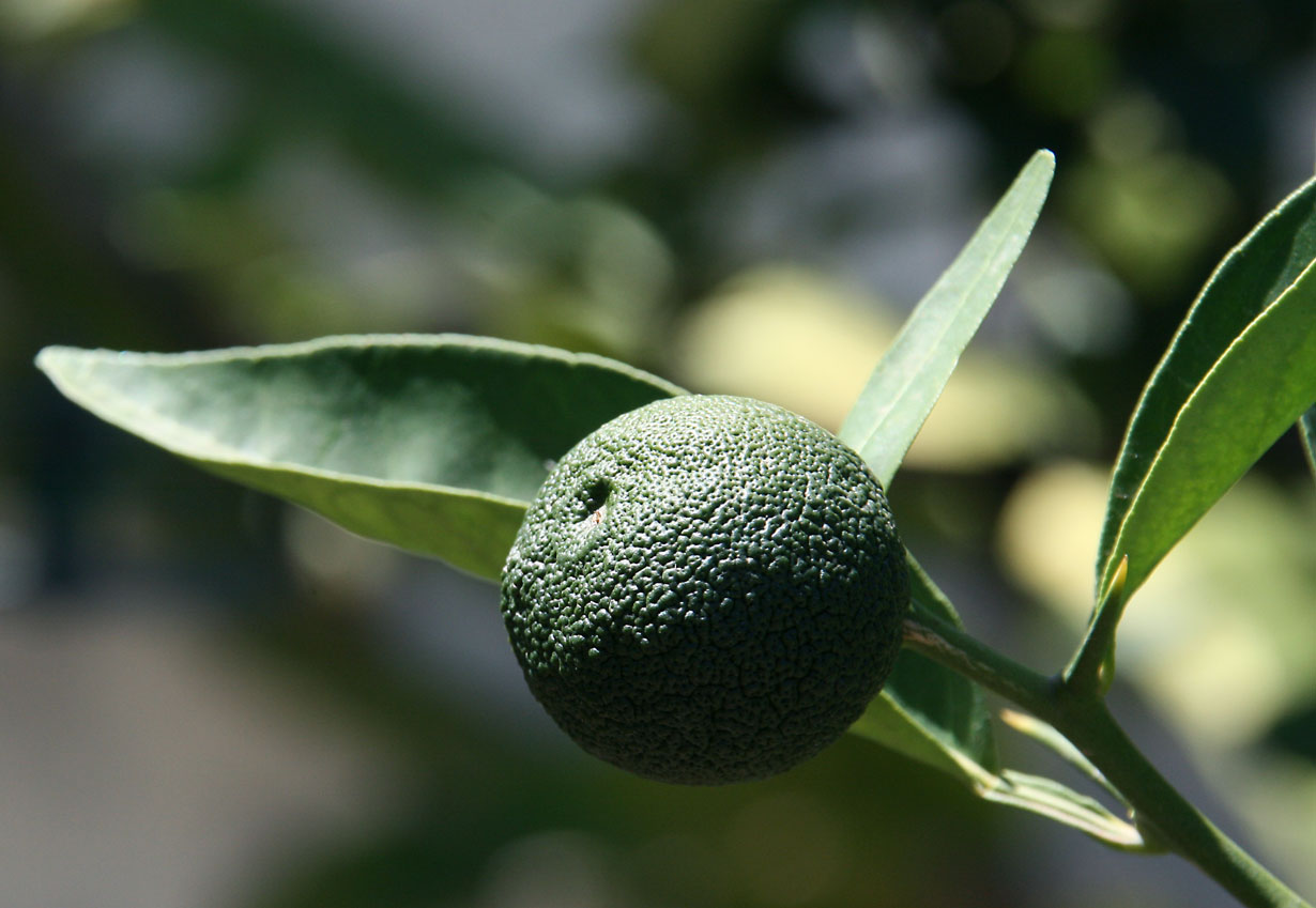 sudachi vert en aout (hémisphère nord)